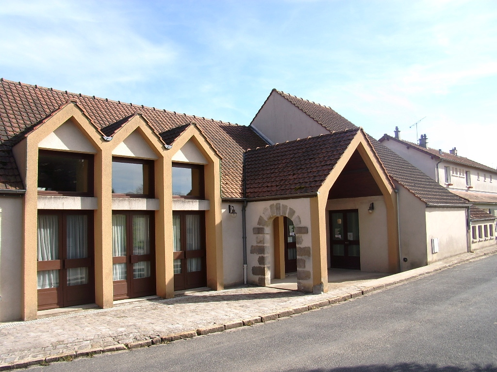 Ecole primaire de Dannemois